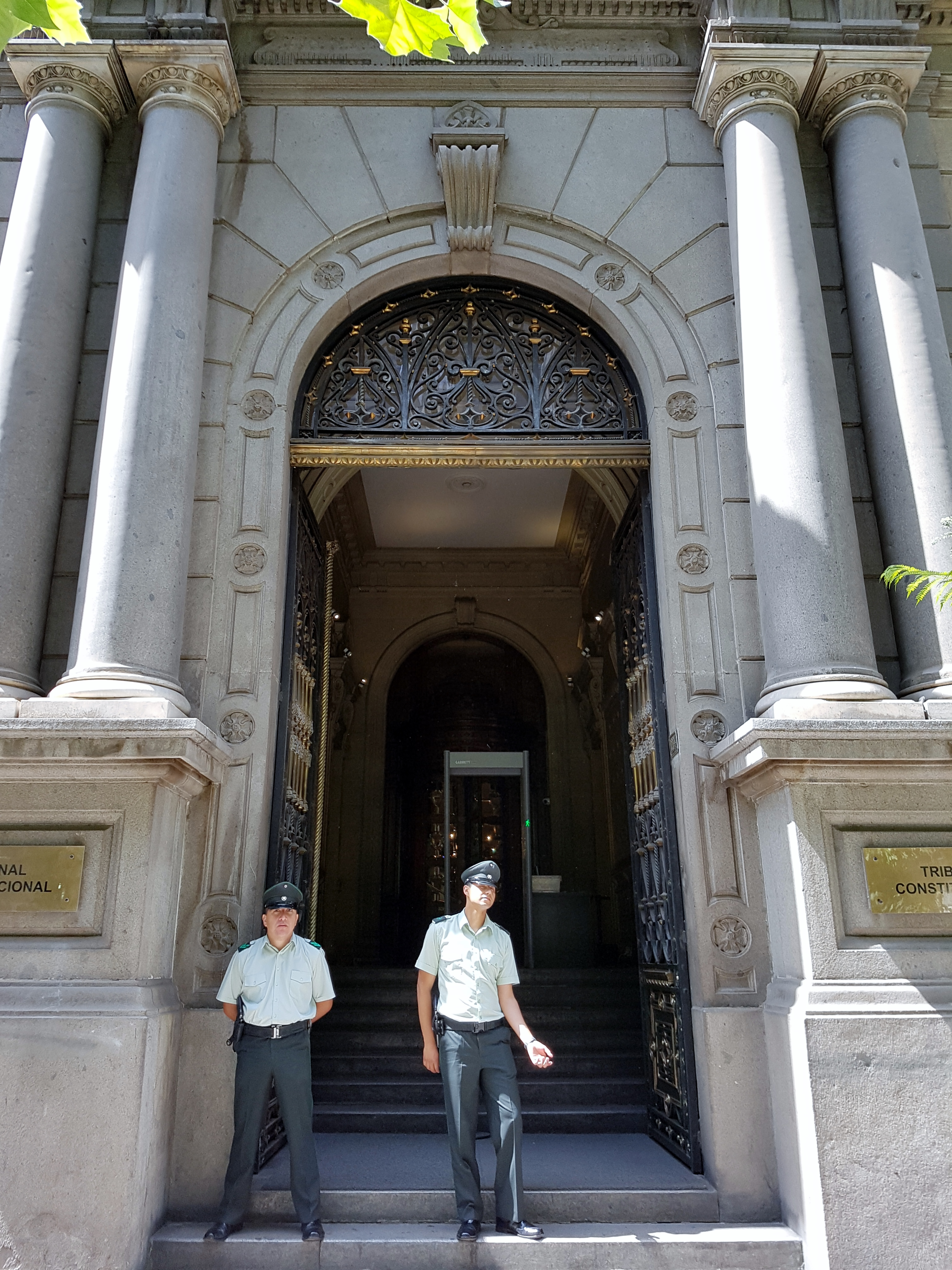 Entrada al Tribunal Constitucional de Chile, calle Huérfanos 1234, Santiago